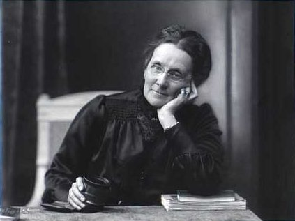 fotograf Julie Rasmine Marie Laurberg (1856-1925)